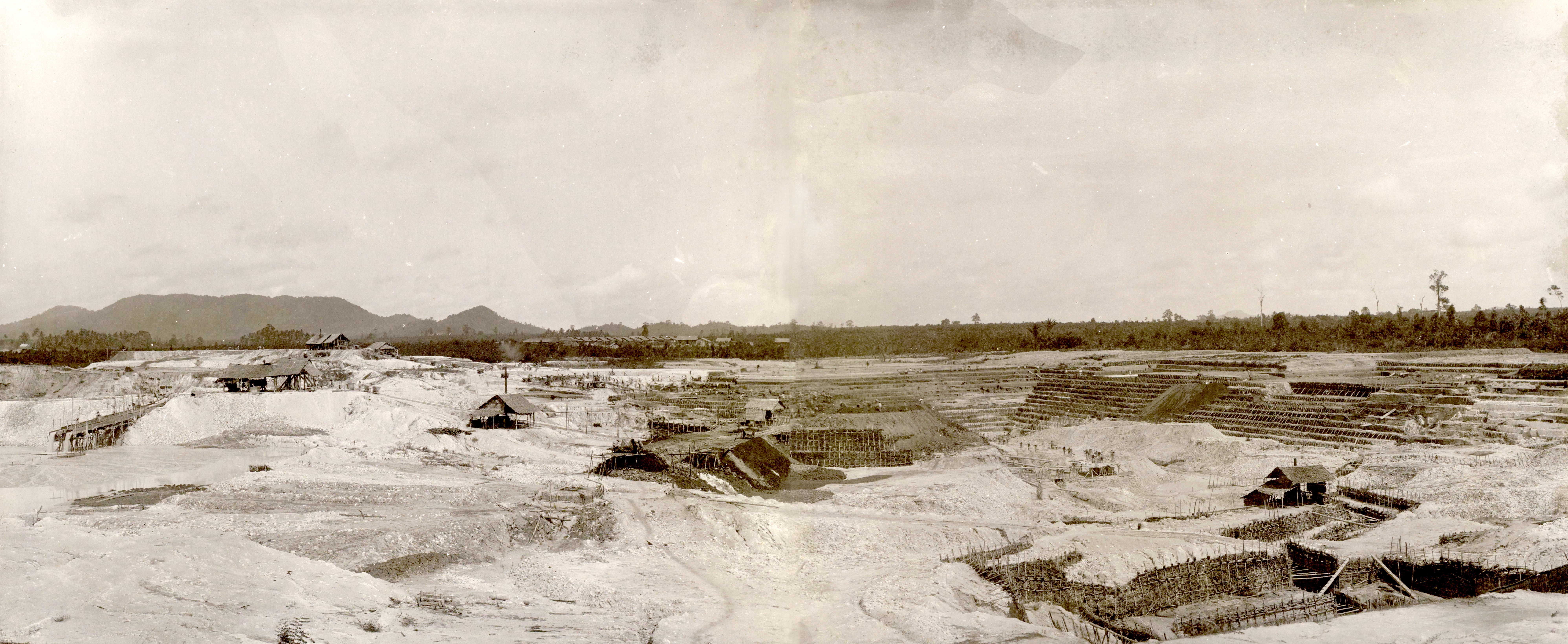 IdentificatieTitel(s): Gezicht op een tinmijn te SoengeiliatSoengeiliat. Mijn 3. Panorama-opname van een der grootste tinmijnen op Banka (titel op object)Objecttype: foto panoramafoto Objectnummer: RP-F-F01183-AQOmschrijving: Panorama bestaande uit twee foto's. Onderdeel van Fotoalbum over de tinwinning op Bangka.VervaardigingVervaardiger: fotograaf: anoniemPlaats vervaardiging: SoengeiliatDatering: ca. 1900 - ca. 1920Fysieke kenmerken: ontwikkelgelatinezilverdrukMateriaal: fotopapier Techniek: ontwikkelgelatinezilverdrukAfmetingen: foto links: h 231 mm × b 276 mmfoto rechts: b 231 mm × b 281 mmgeheel: h 231 mm × b 560 mmOnderwerpWat: minerals and metals: tinminingWaar: SoengeiliatWie: Banka-tinwinningVerwerving en rechtenVerwerving: overdracht van beheer 1994Copyright: Publiek domein